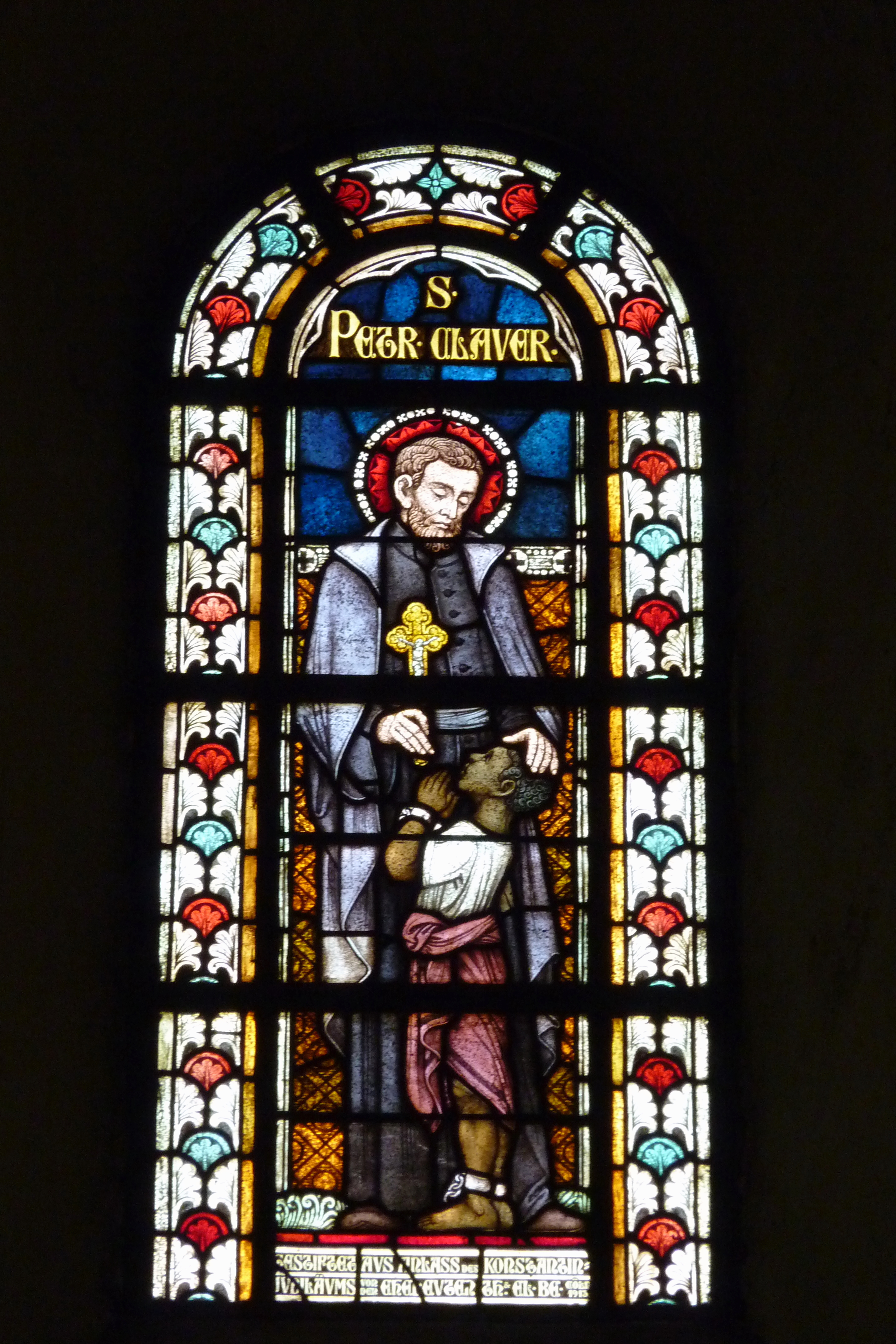 Katholische Kirche St. Maria Magdalena und St. Andreas des ehemaligen Prämonstratenser-Klosters Knechtsteden in Dormagen im Rhein-Kreis Neuss (Nordrhein-Westfalen), Bleiglasfenster im Langhaus von 1913, Darstellung: Petrus Claver